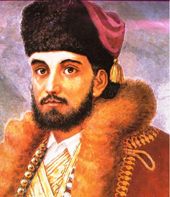 Vladika Danilo.